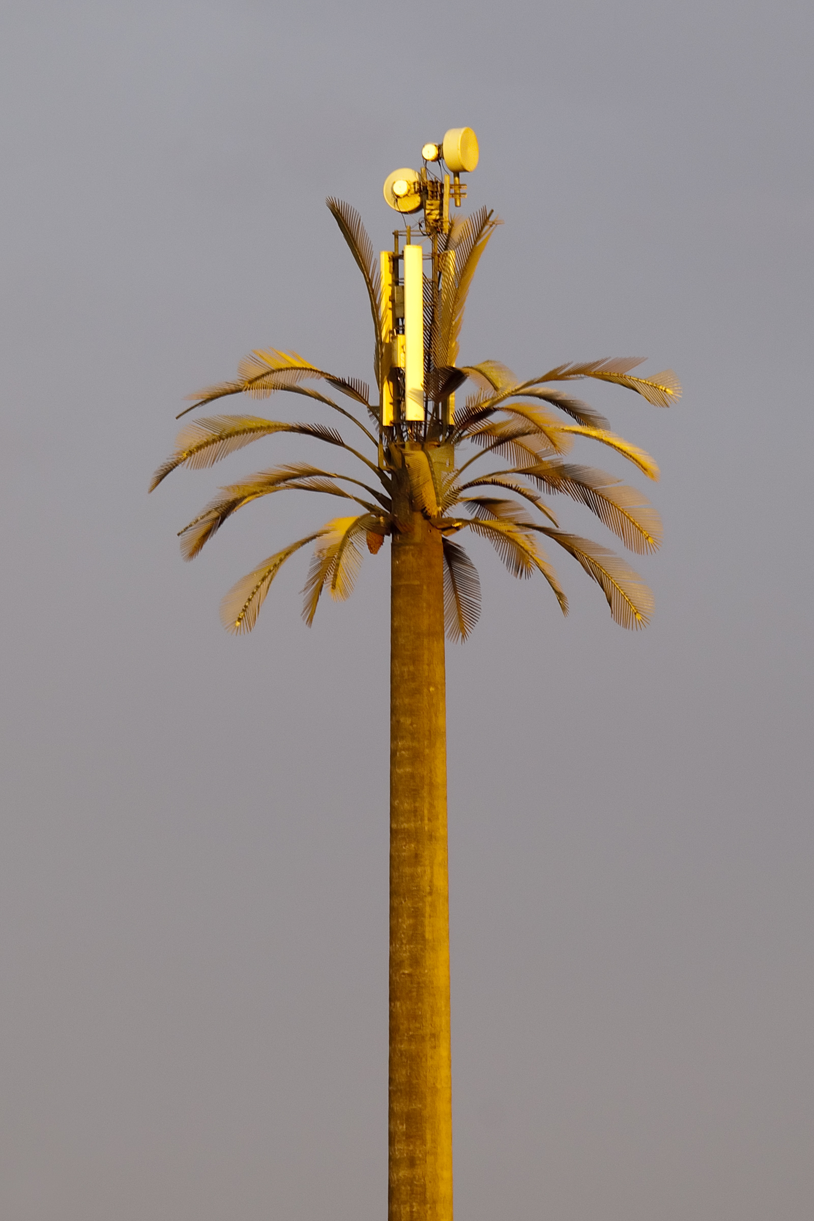 Egypte El Gouna november 2012